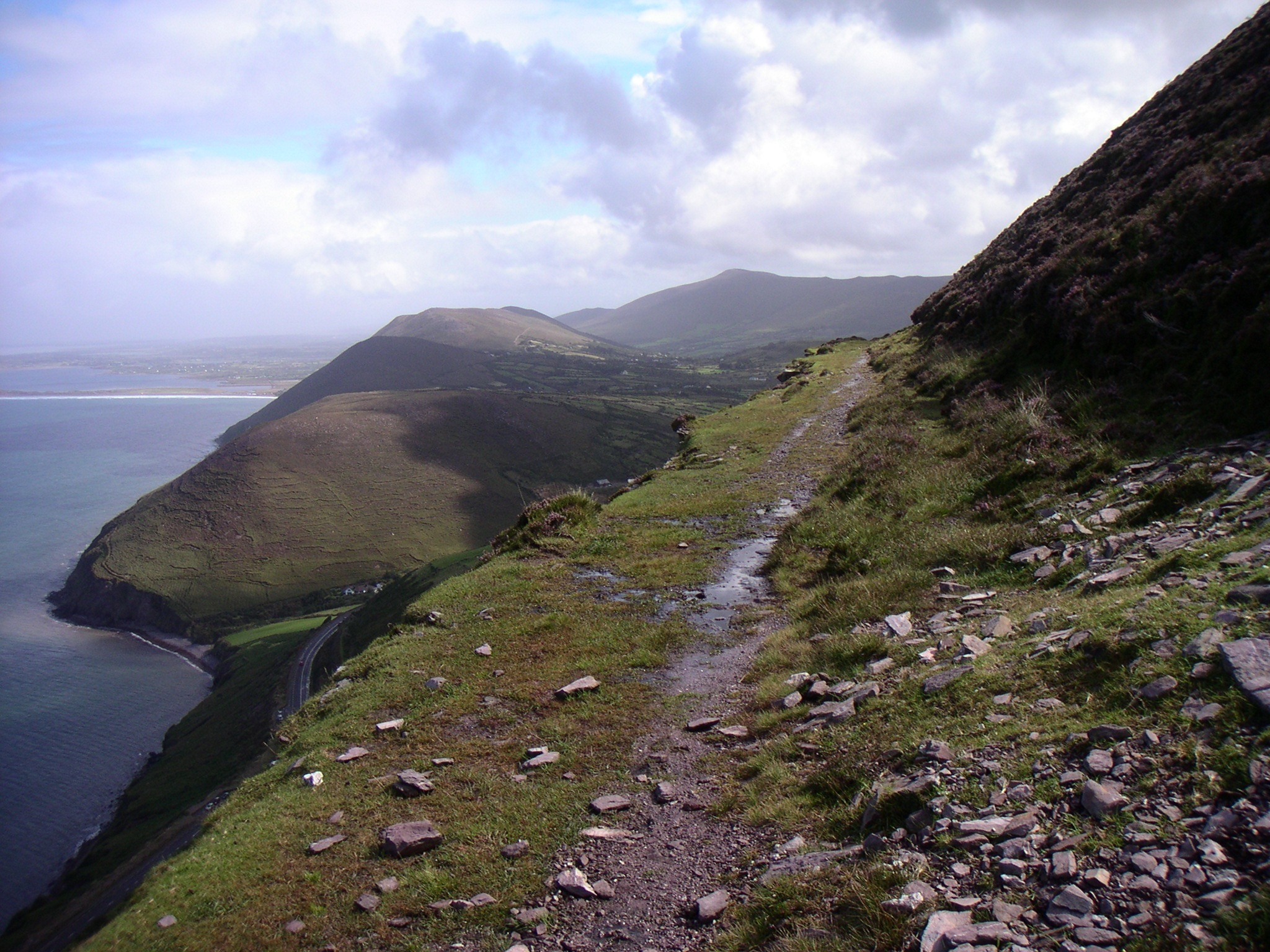 Abschnitt des Kerry Way, Irland, auf der Trasse der stillgeglegten und abgebauten Bahnstrecke Farranfore – Valencia Harbour